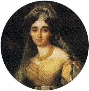 Leopoldina Grafin von Berg (1786-1874), geb. Donna Leopoldina Cicogna Mozzoni dei Conti Terdobbiate, the widow of Count Alessandro Annoni